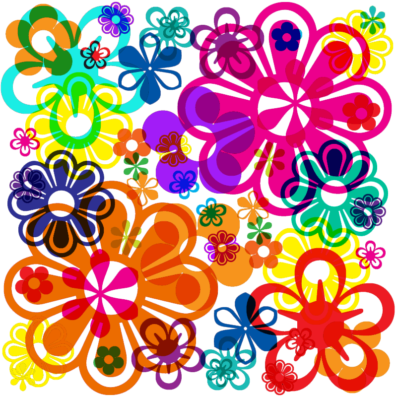 Psychedelic_dingbats, PNG version